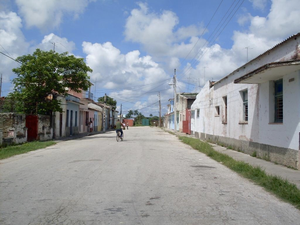 Plácido desde Máximo Gómez hacia Méndez Capote